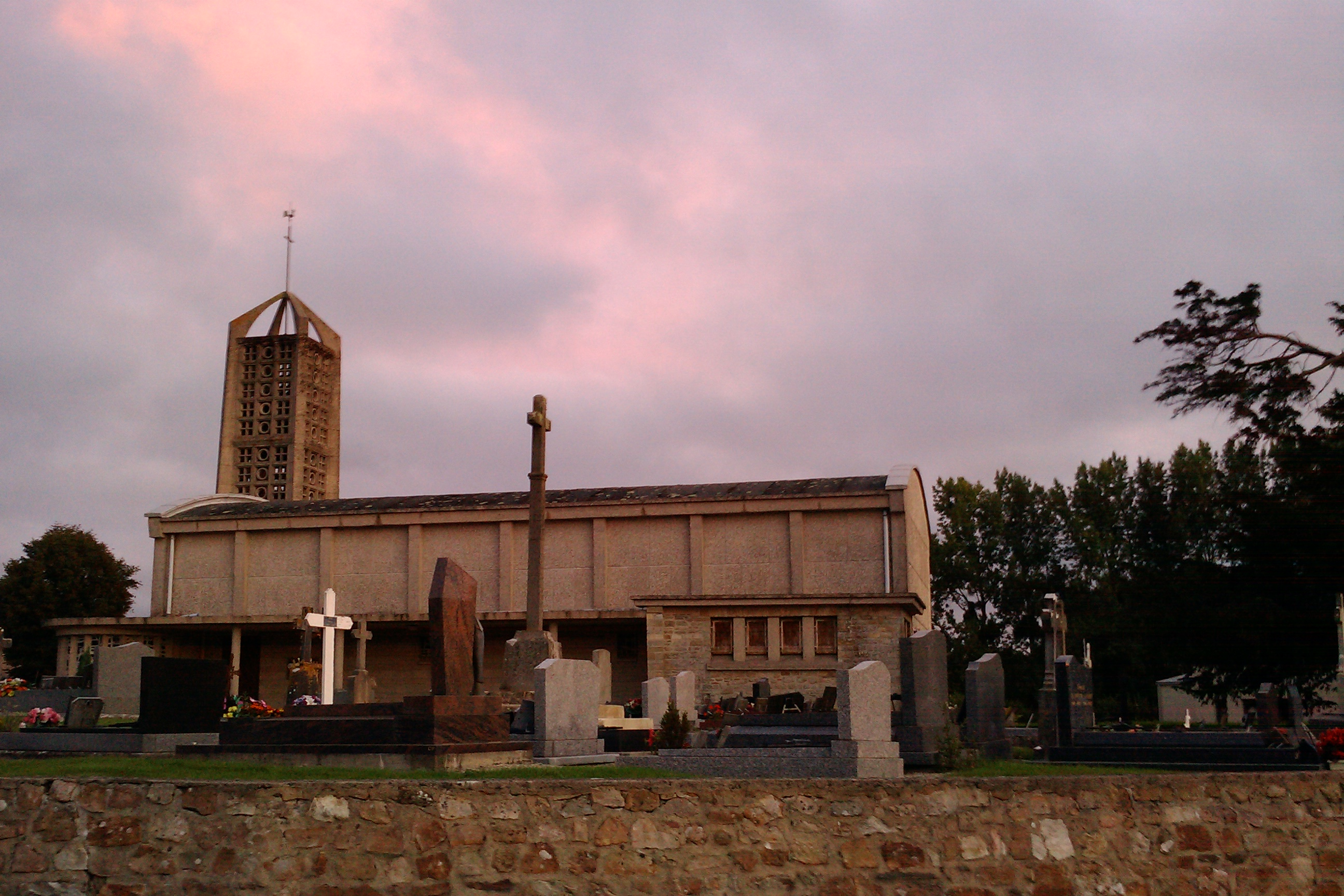 Laulne